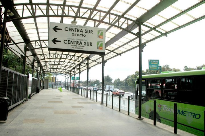 El Trebol